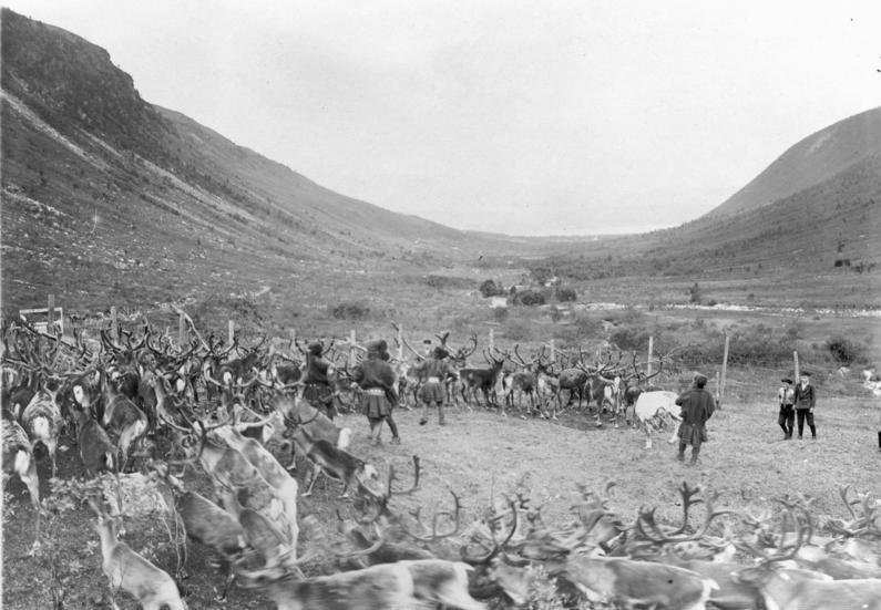 Polarfahrt mit dem Dampfer "München".- Bei den Renntierherden 17. Juli - 12. August 1925